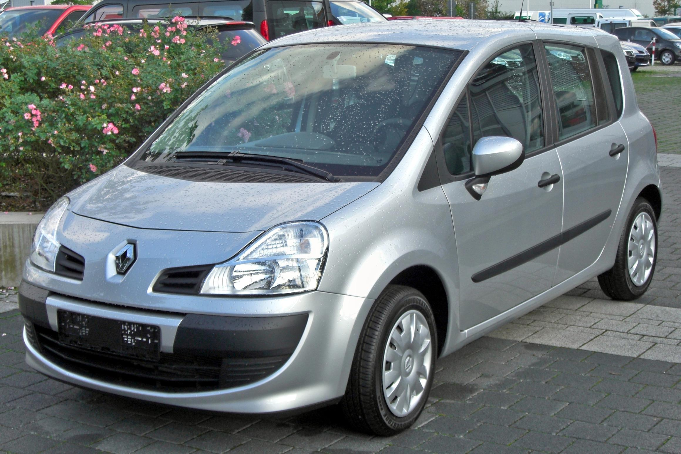 Renault Grand Modus